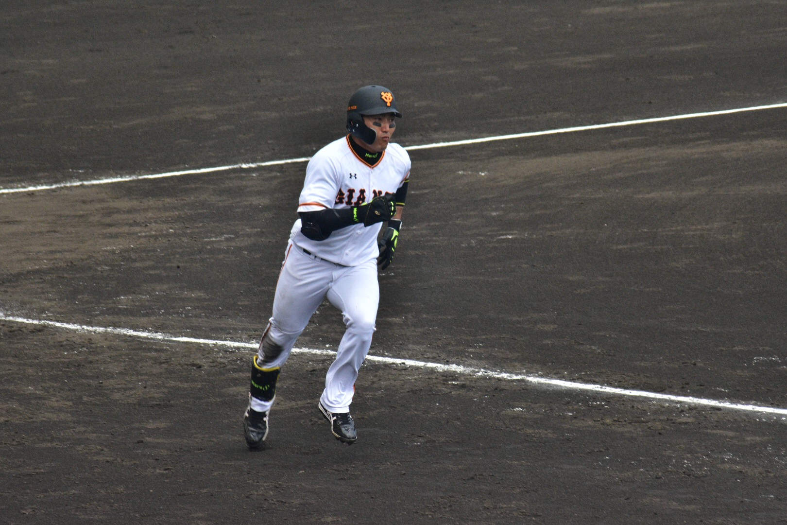 2019年2月23日、セルラースタジアム那覇にて撮影。